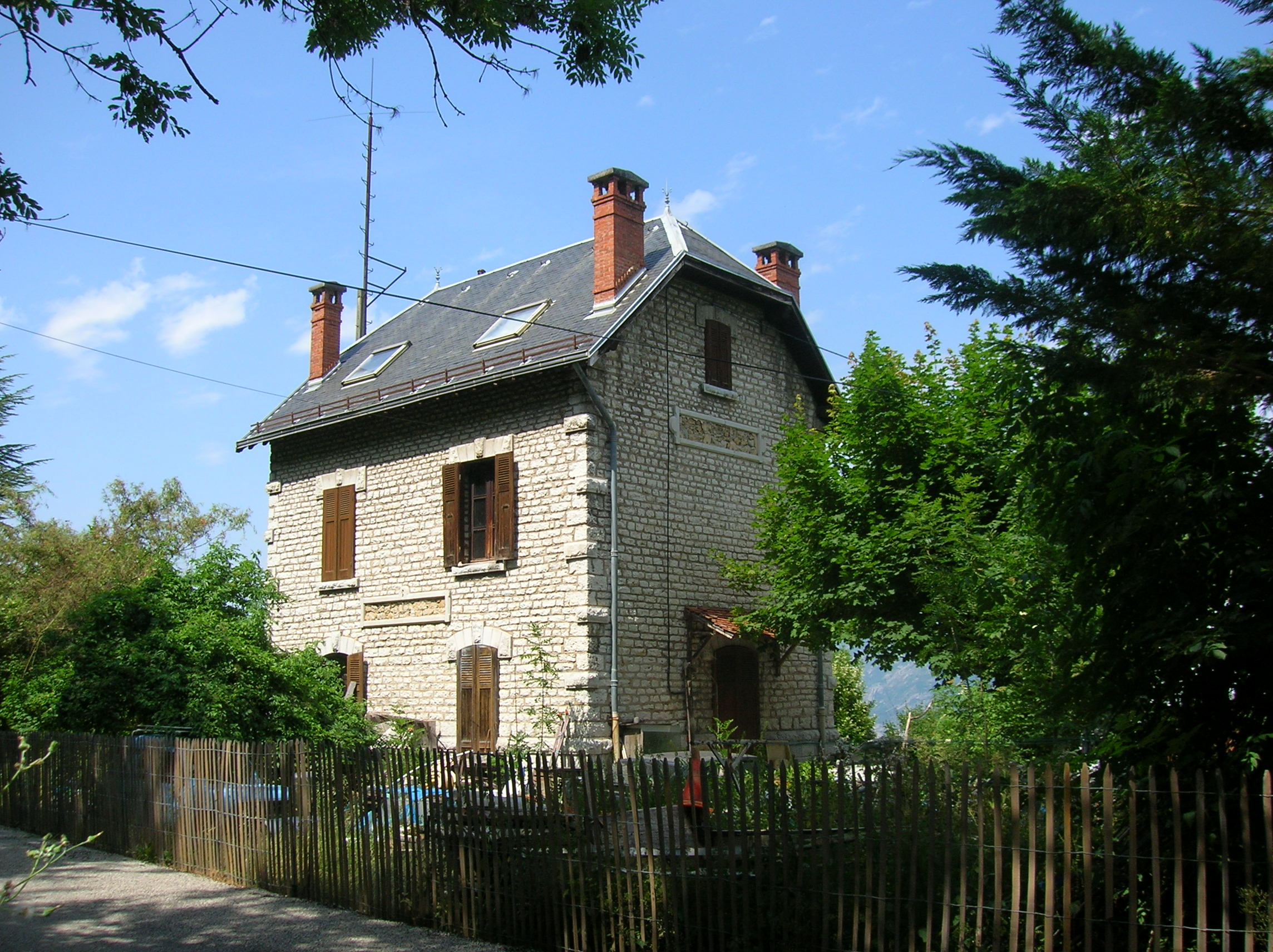 ancienne gare du tram de Pariset, Tramway Grenoble - Villard-de-Lans. Seyssinet-Pariset, Isère, AuRA, France.